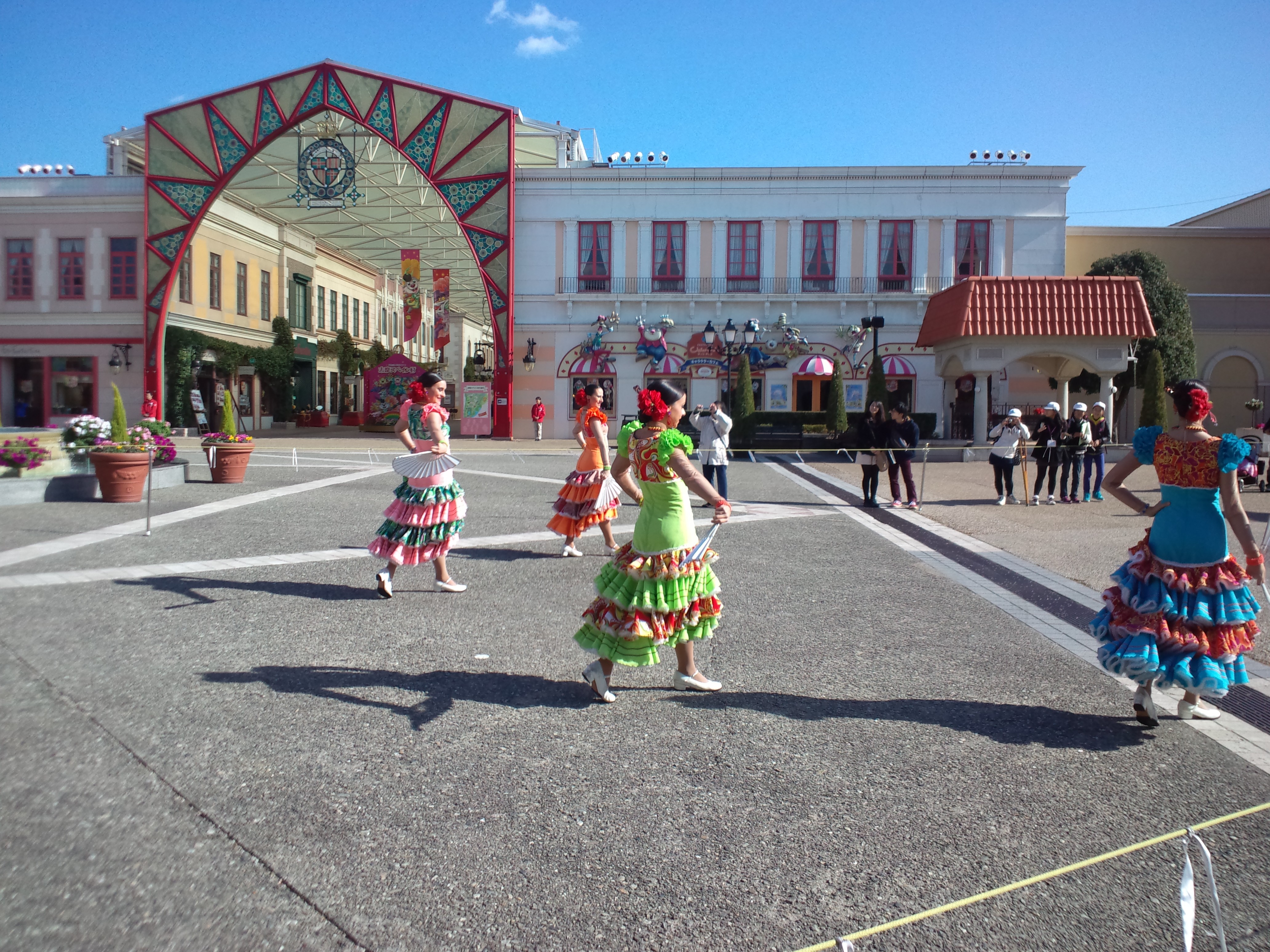 志摩スペイン村、パルケエスパーニャ カーニバル